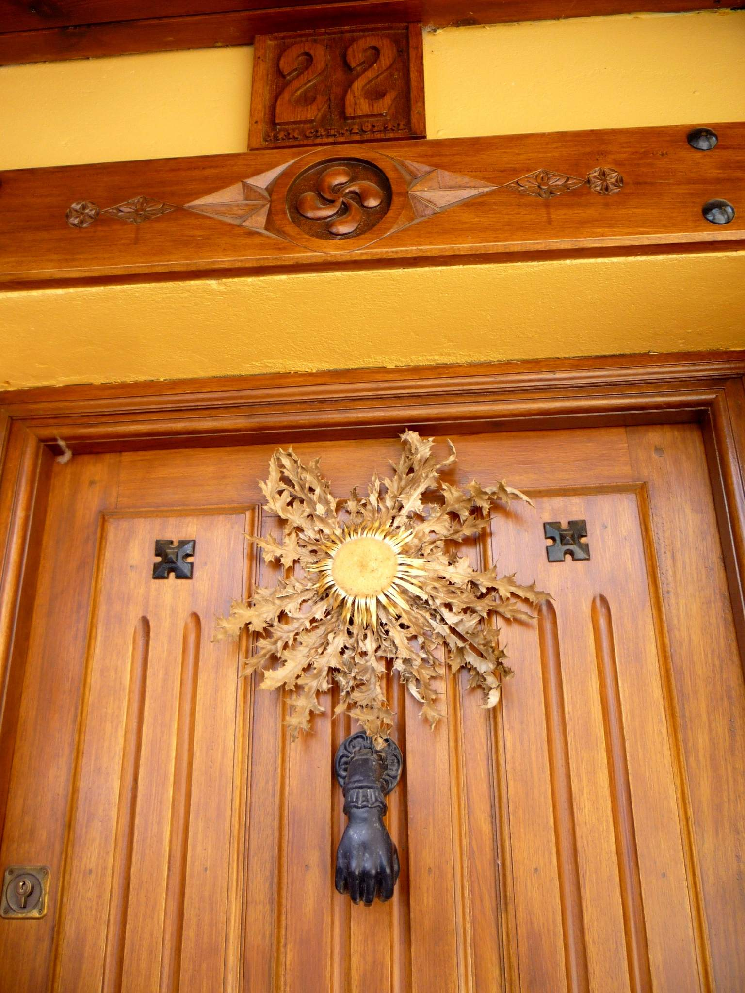 Eguzki-lorea en Baños de Ebro (Álava)